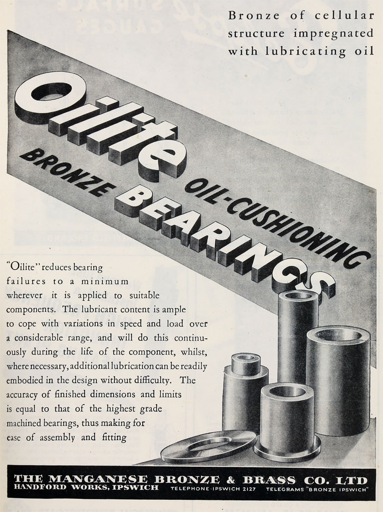 Imagen publicadaen la web Grace's Guide, ilustrando un artículo sobre la compañía etalúrgica británica Manganese Bronze & Brass Co. LTD